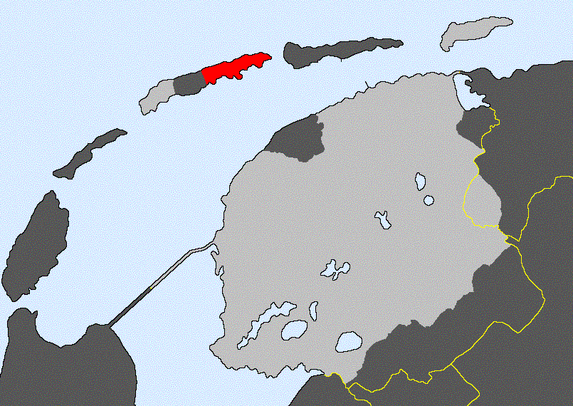 Nedersaksies: Taelgebied van t Oosterskellings